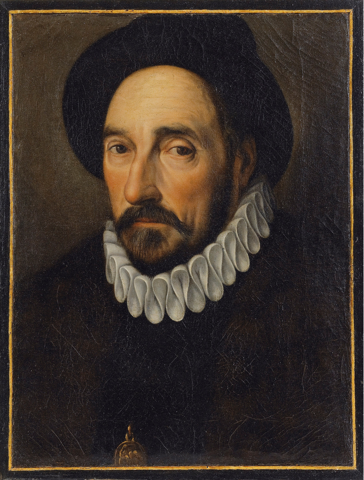 Portrait en buste de Montaigne, la tête tournée à gauche. Huile sur toile non signée.